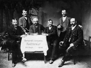 Sauschneider Congress 1908